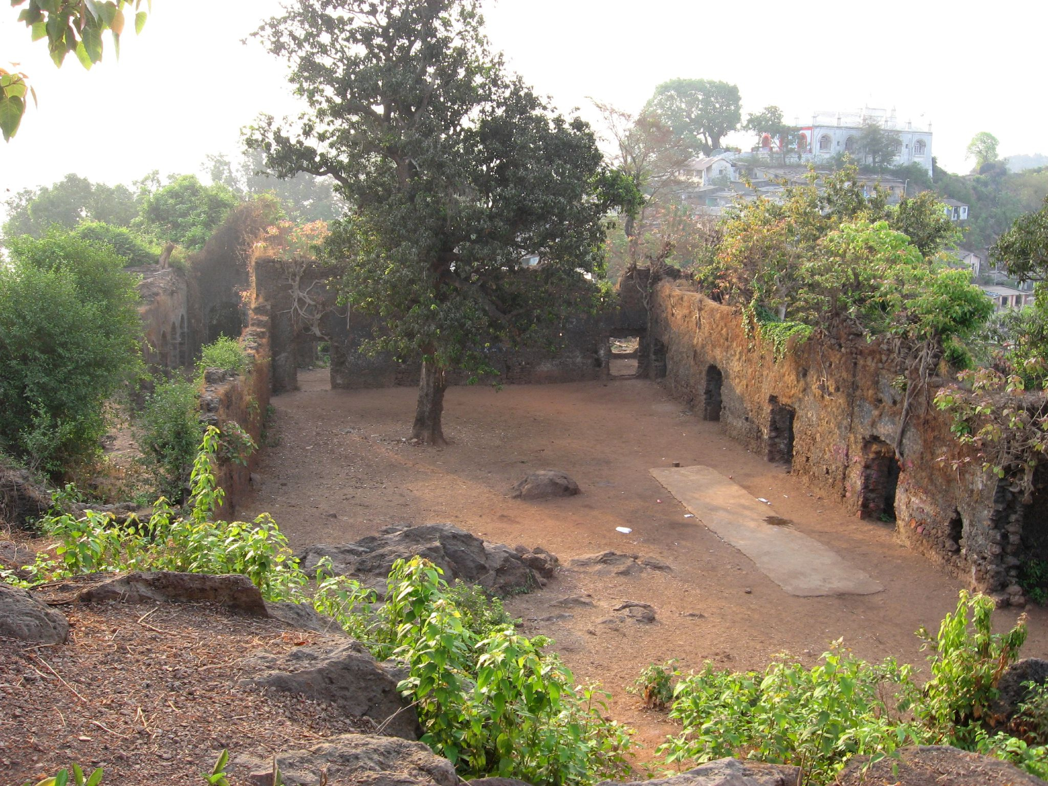 Godhbunder fort